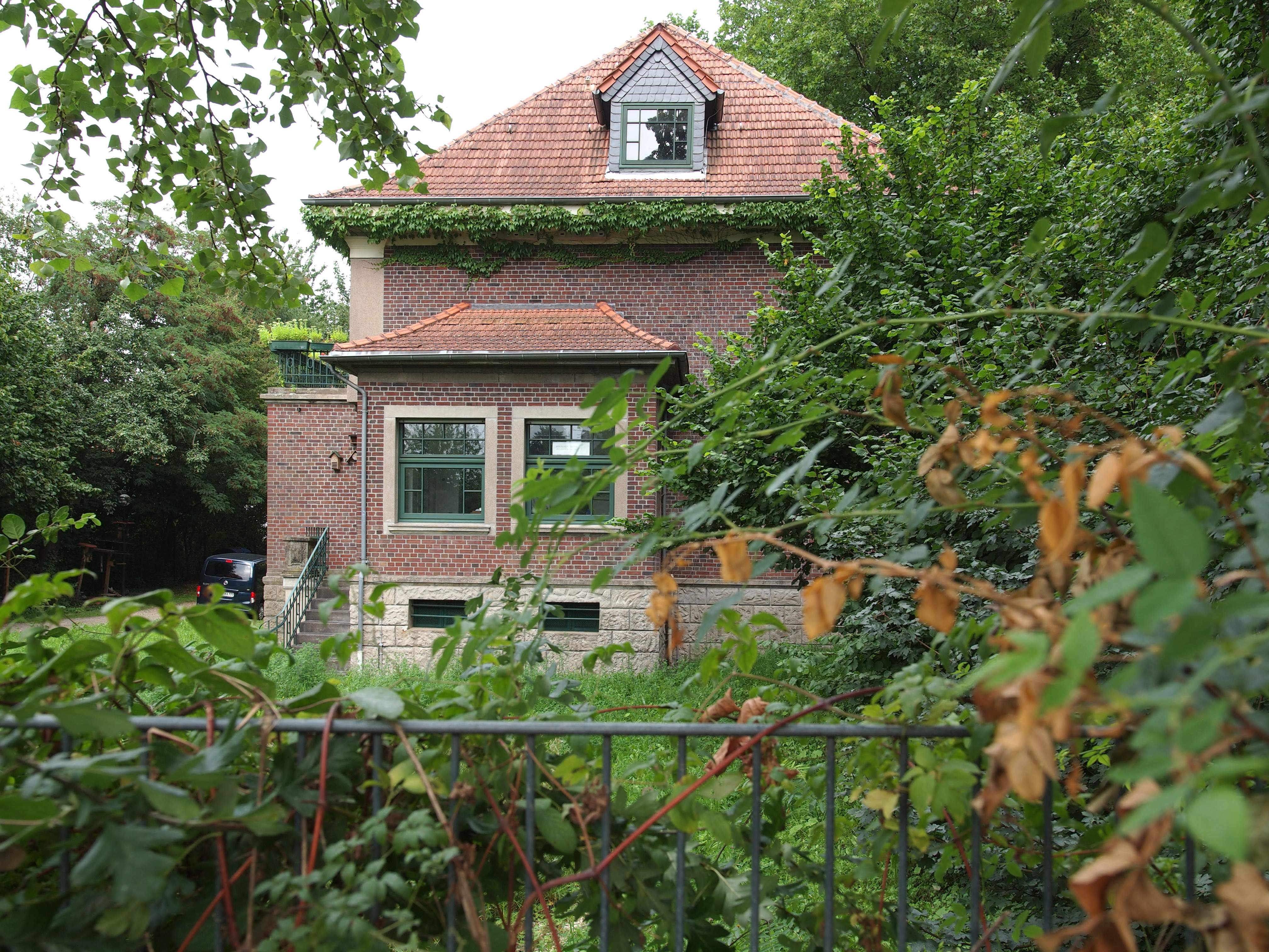 Biologische Station östliches Ruhrgebiet im Haus der Natur, Vinckestraße 91, Herne, Ansicht von Westen (Juri-Gerus-Weg)